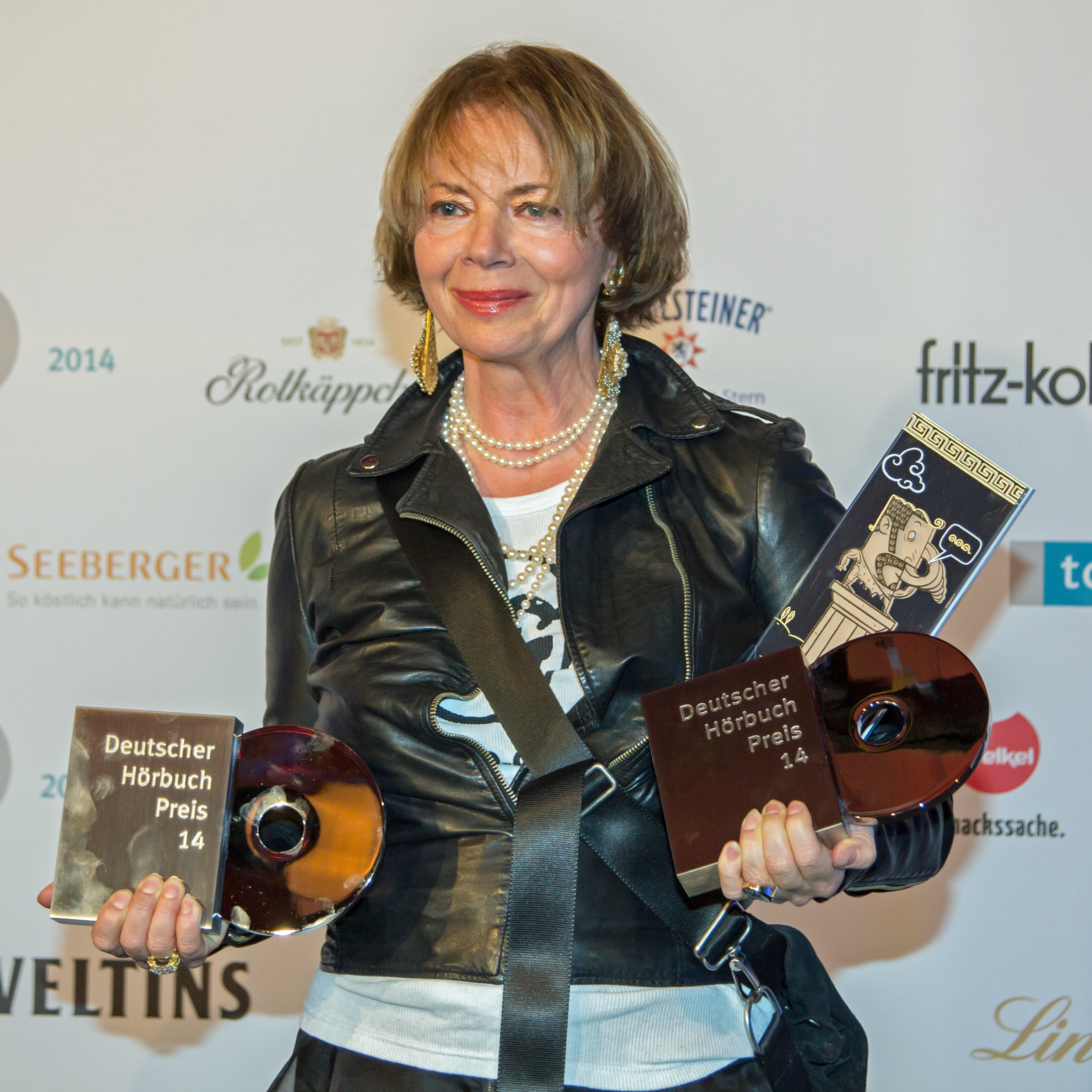 Claudia Baumhöver, Verlagsleiterin "der Hörverlag" mit dem Hörbuchpreis für den besten Interpreten , das beste Hörbuch/Science Fiction und dem HörKules 2014